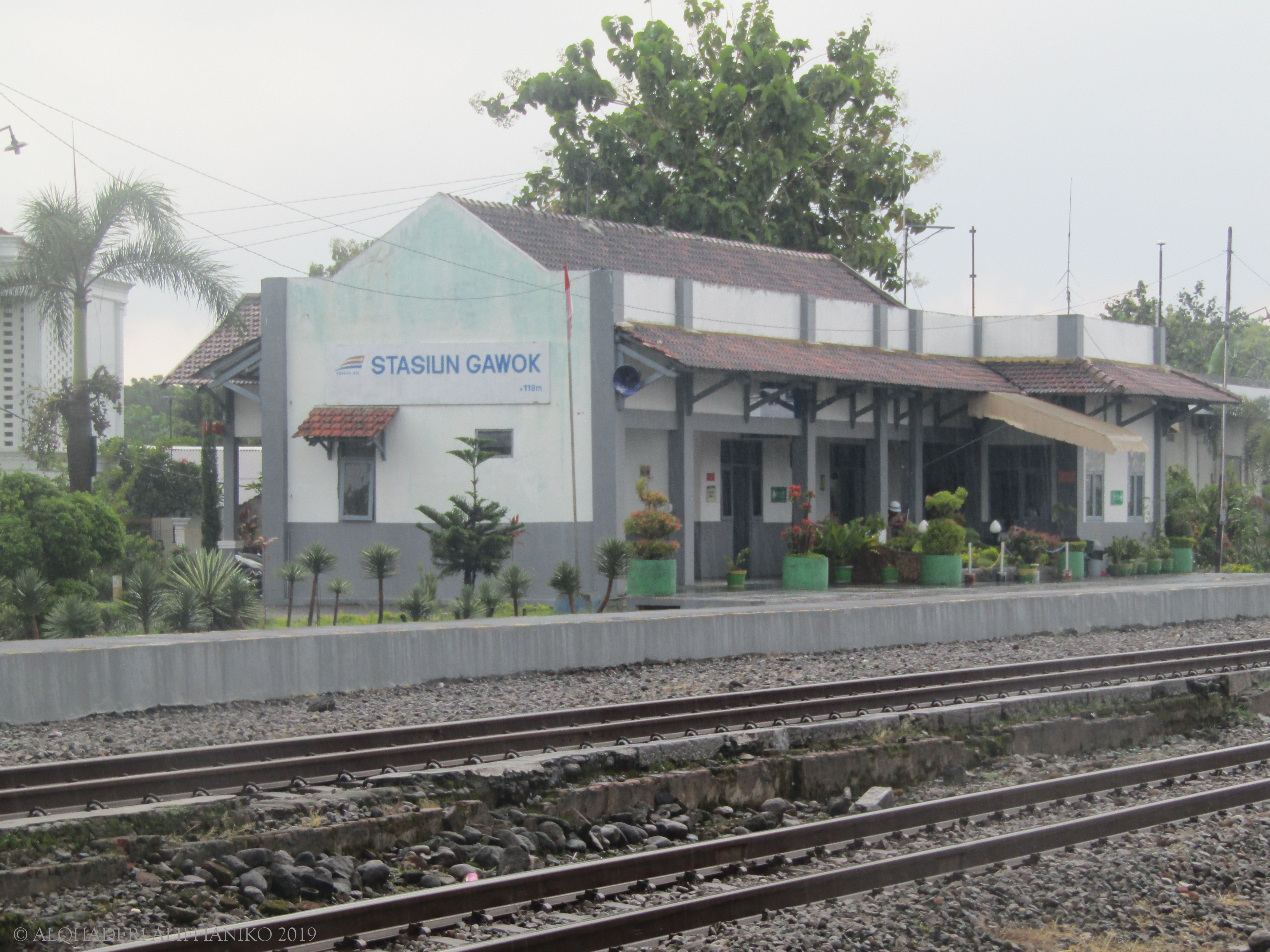 Tampak peron Stasiun Gawok, 2019